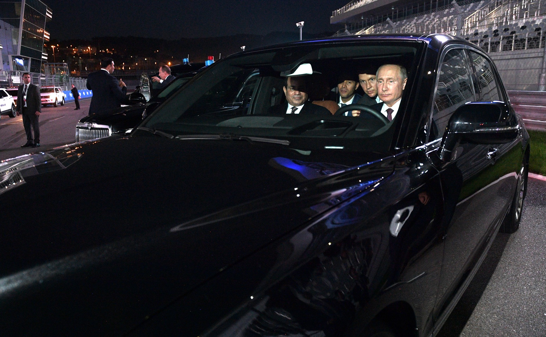 Владимир Путин и Президент Египта Абдельфаттах Сиси совершили поездку по трассе «Сочи Автодром» на одном из новых российских ав